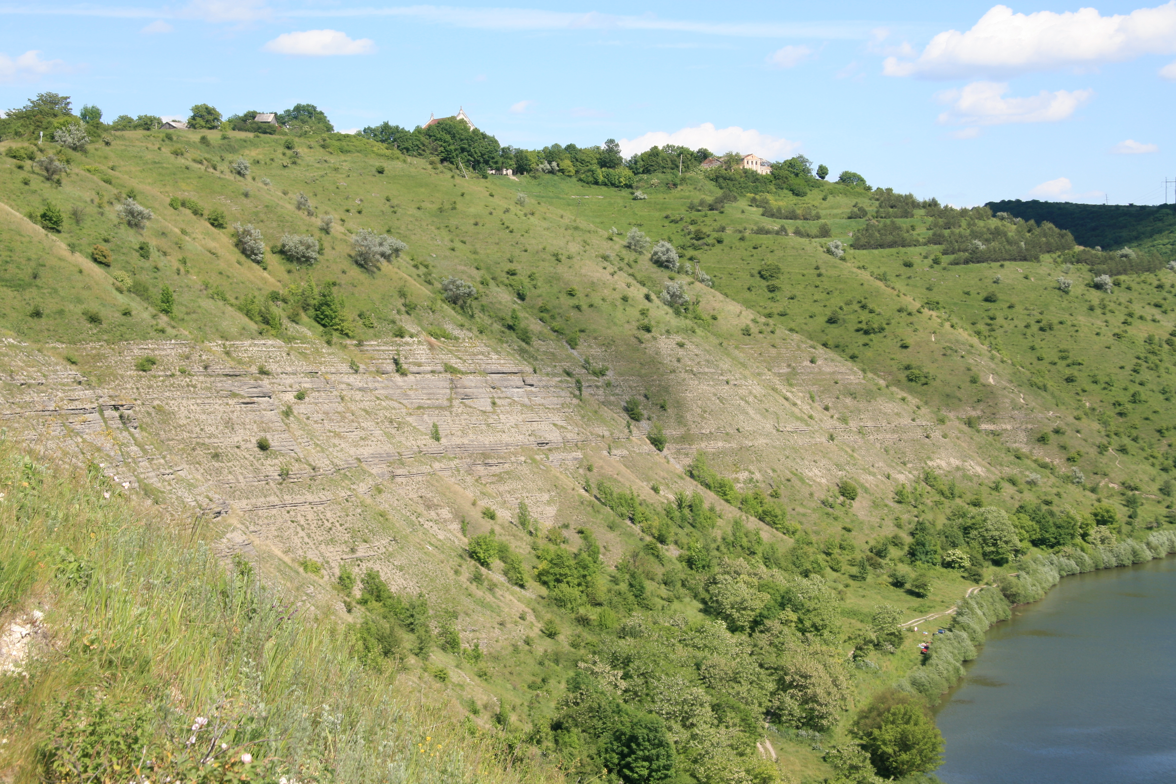 Китайгородське відслонення, Кам'янець-Подільський район, поблизу с. Китайгород